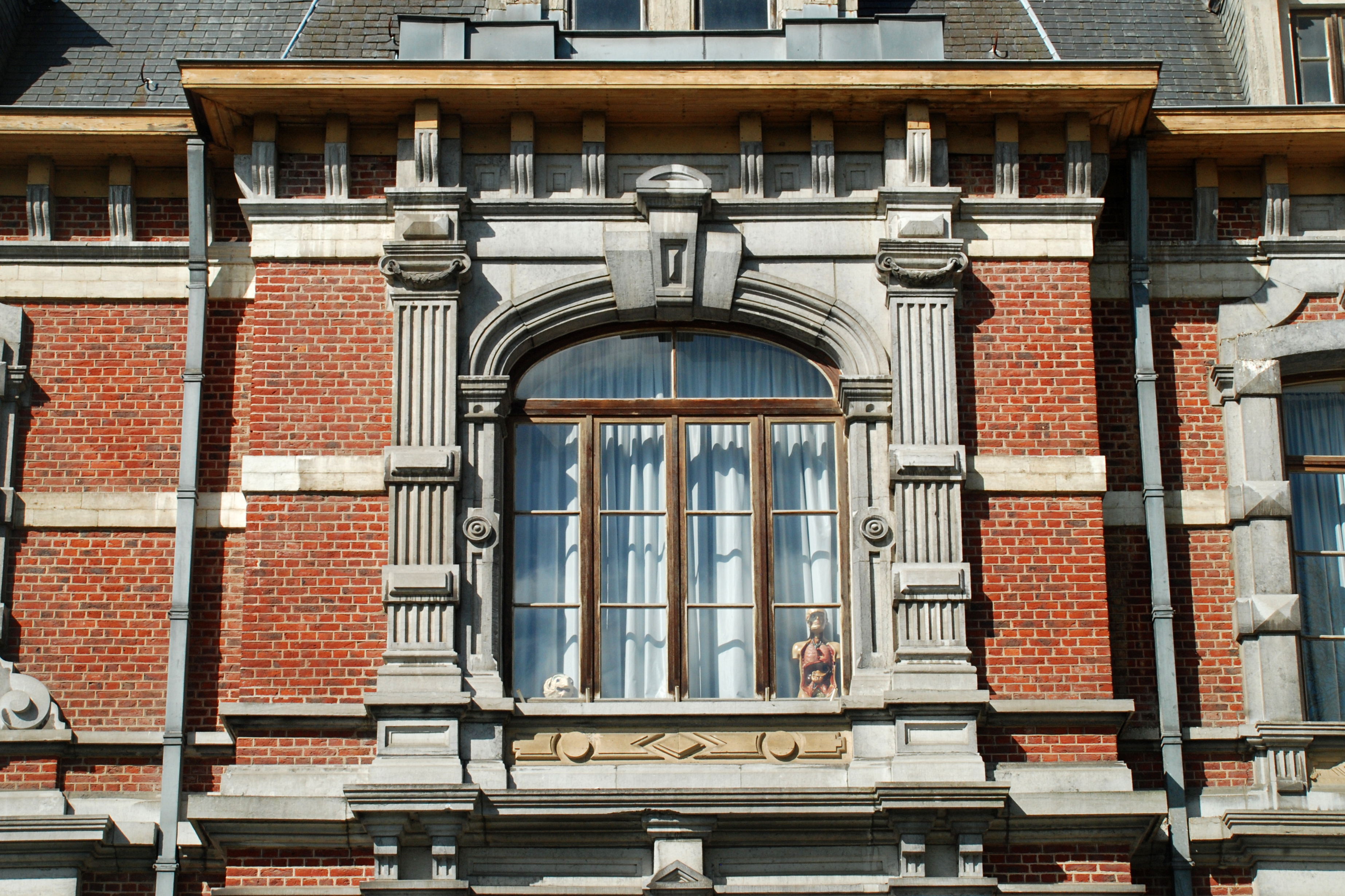 Belgique - Brabant wallon - Court-Saint-Étienne - Château de Wisterzée